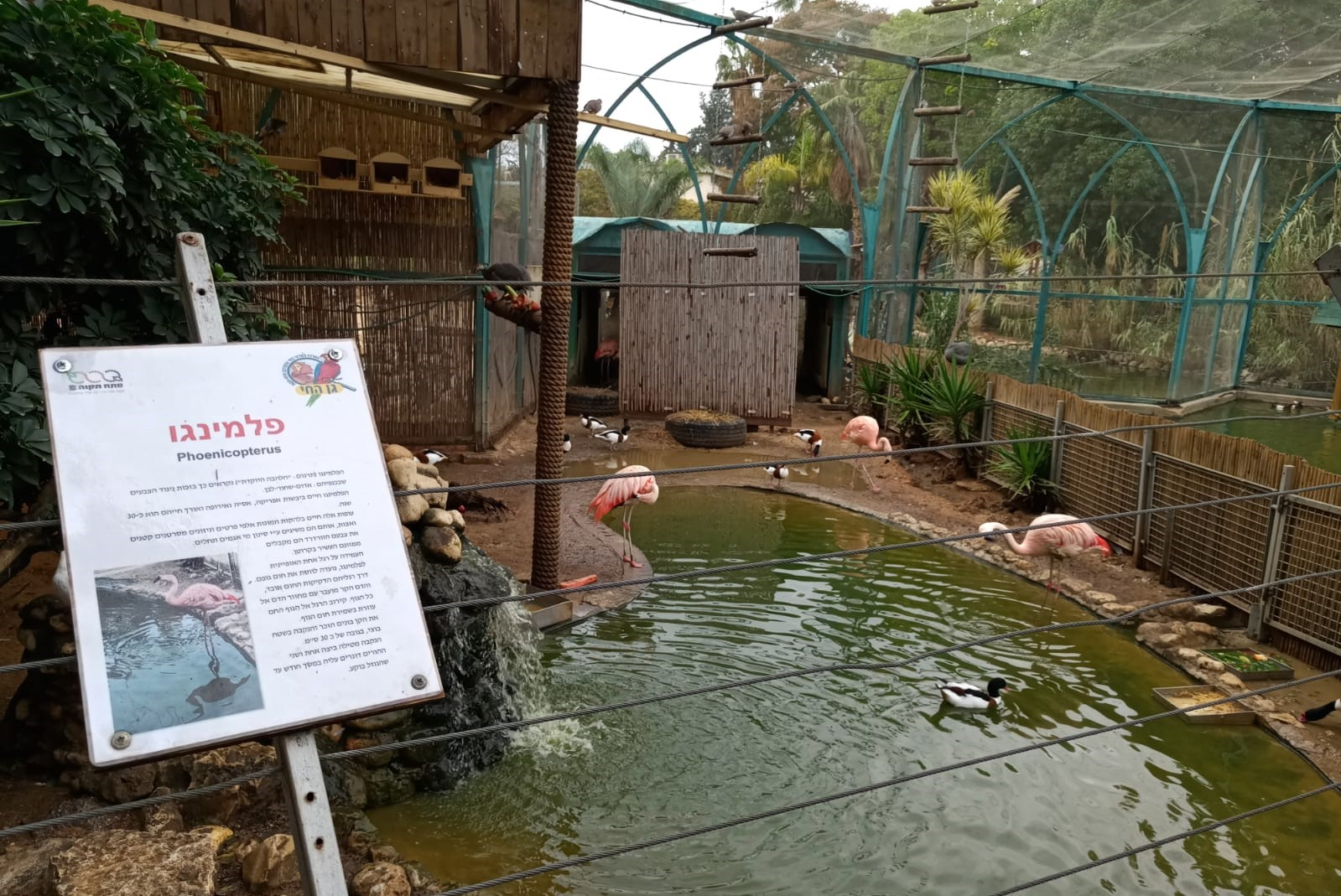 גן החי בפתח תקווה